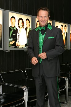 Alexander Rüdiger vor der ORF Starwand